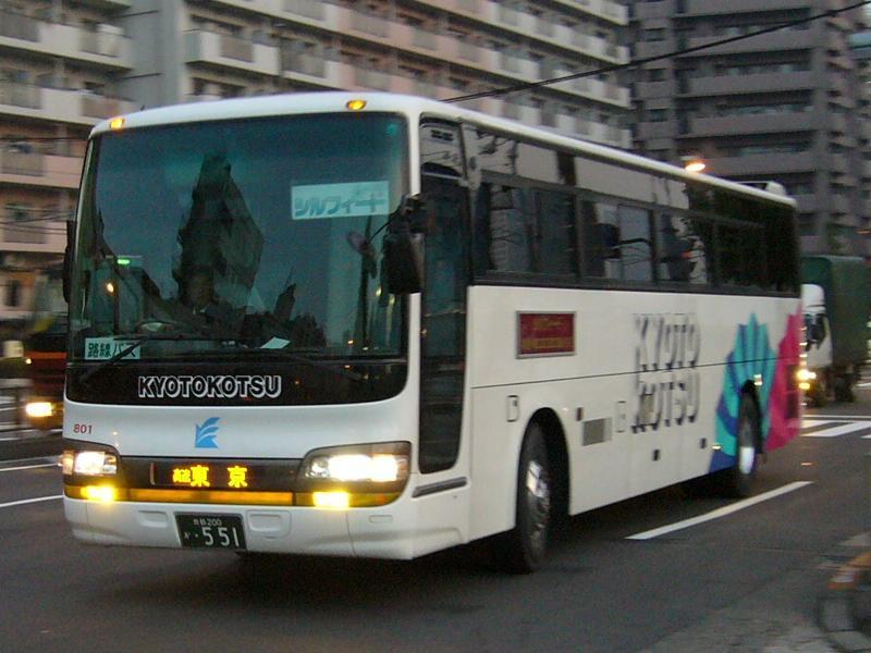 登録番号 京都200か・551 京都交通所属 シルフィード号用 2005年11月24日 品川高速バスターミナル付近にて撮影